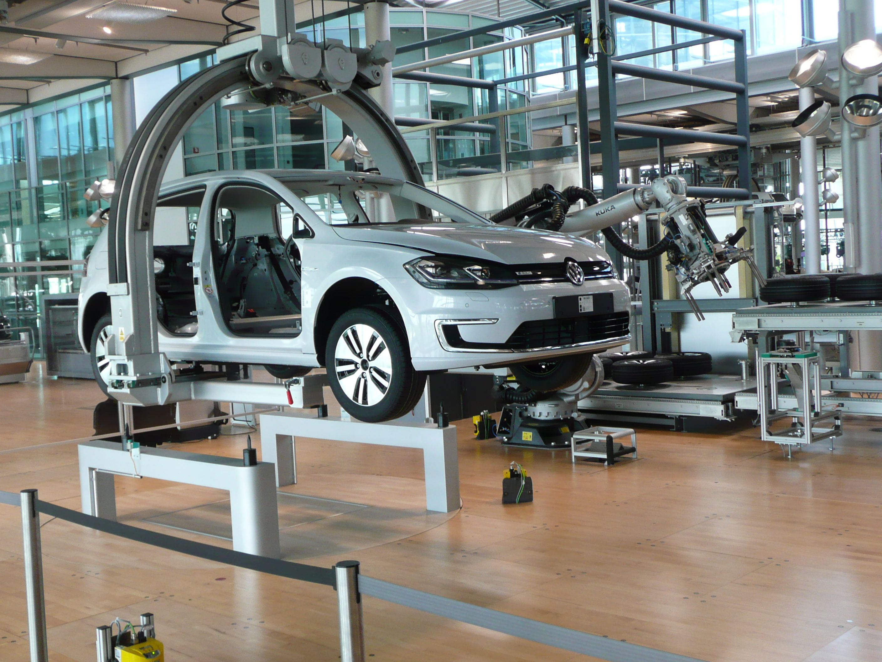 Roboterarbeitsplatz zur Scheibenmontage am e-Golf in der Gläsernen Manufaktur